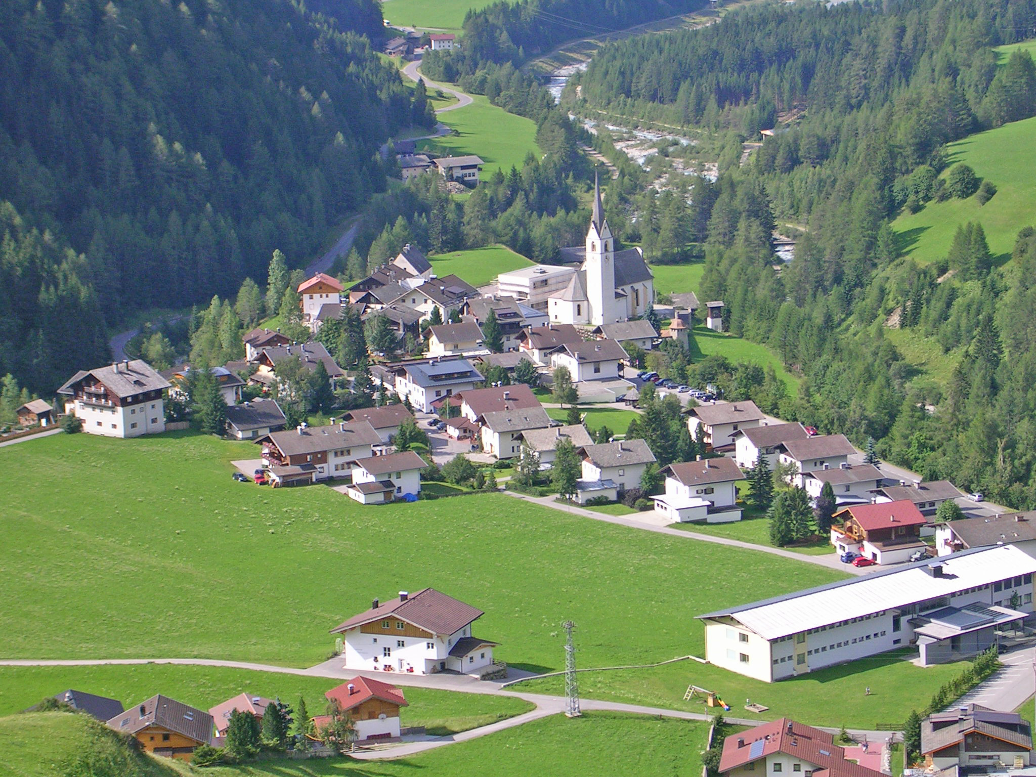 *Sujet: Ködnitz Source: Eege Foto vum User:Geiserich77